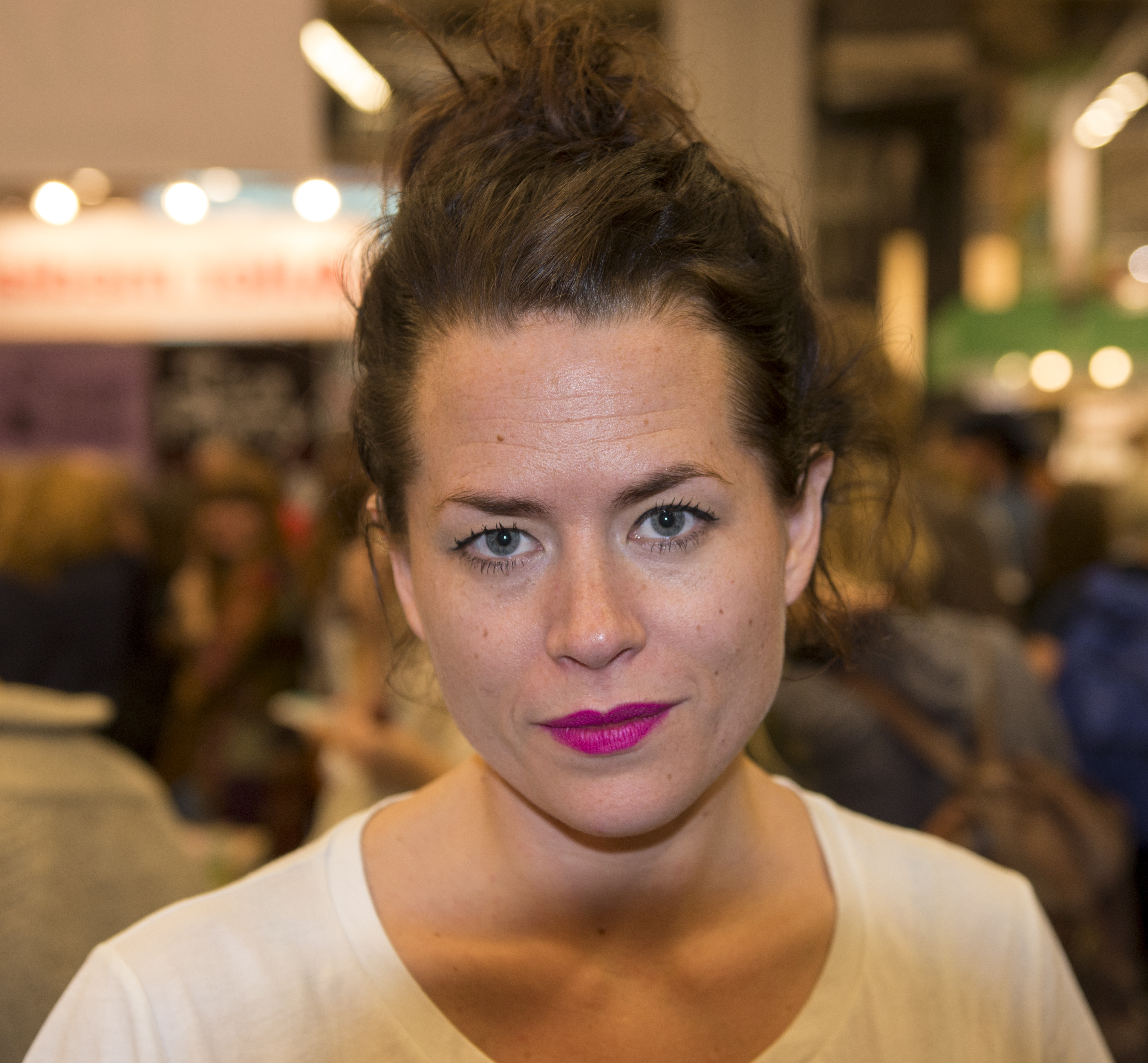 Liv Strömquist på Bokmässan i Göteborg 2013.